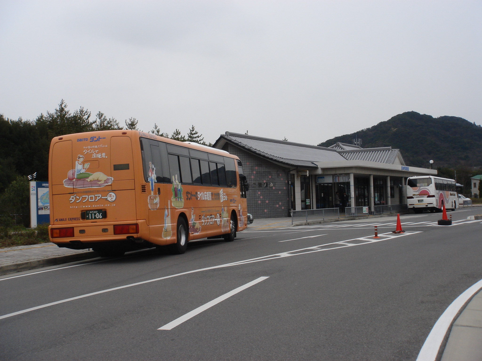 陸の港西淡 Rikunominato Bus station